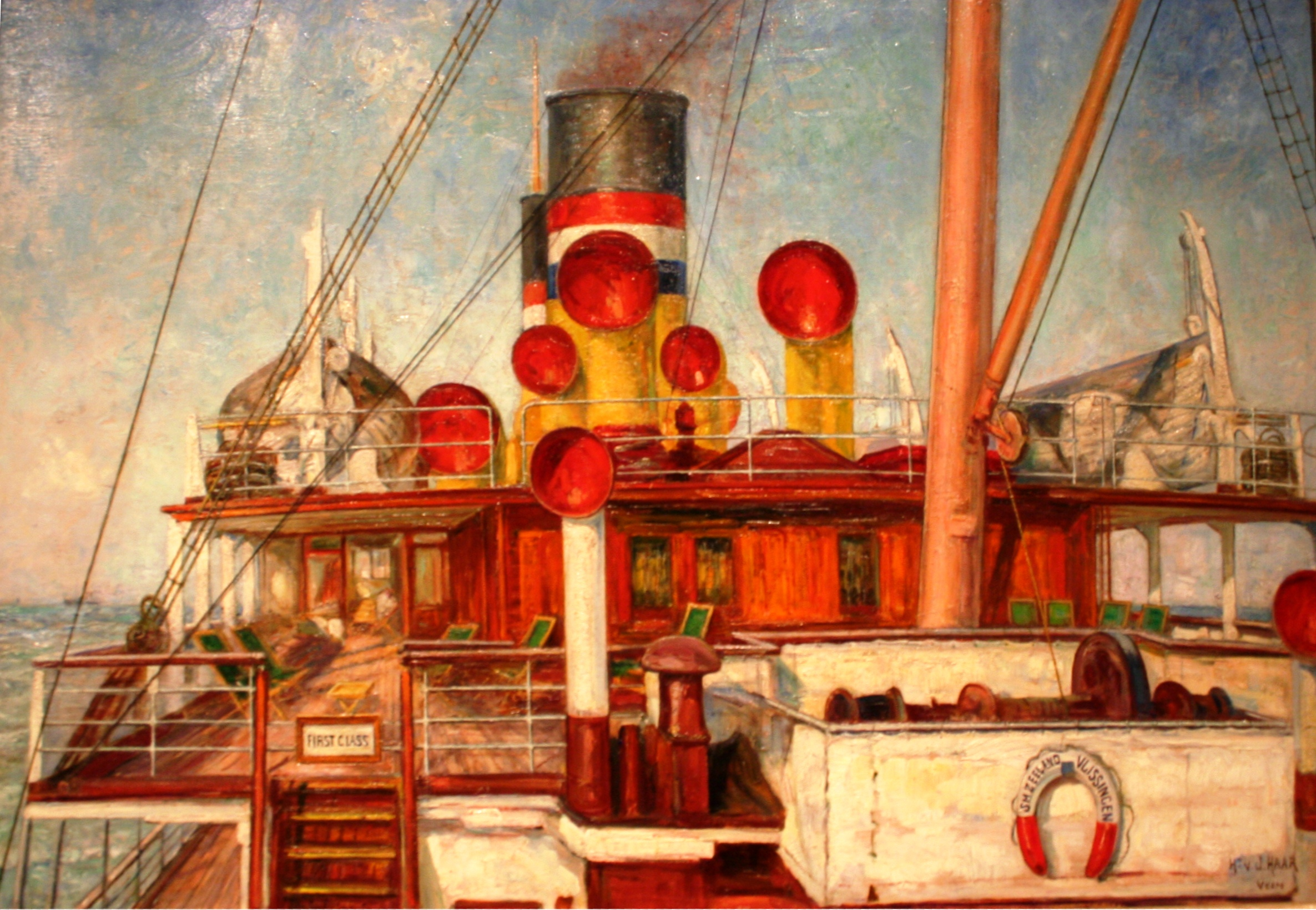 Promenadedek van een schip van de Stoomvaart Maatschappij Zeeland, waarschijnlijk de Princes Juliana of de Mecklenburg.